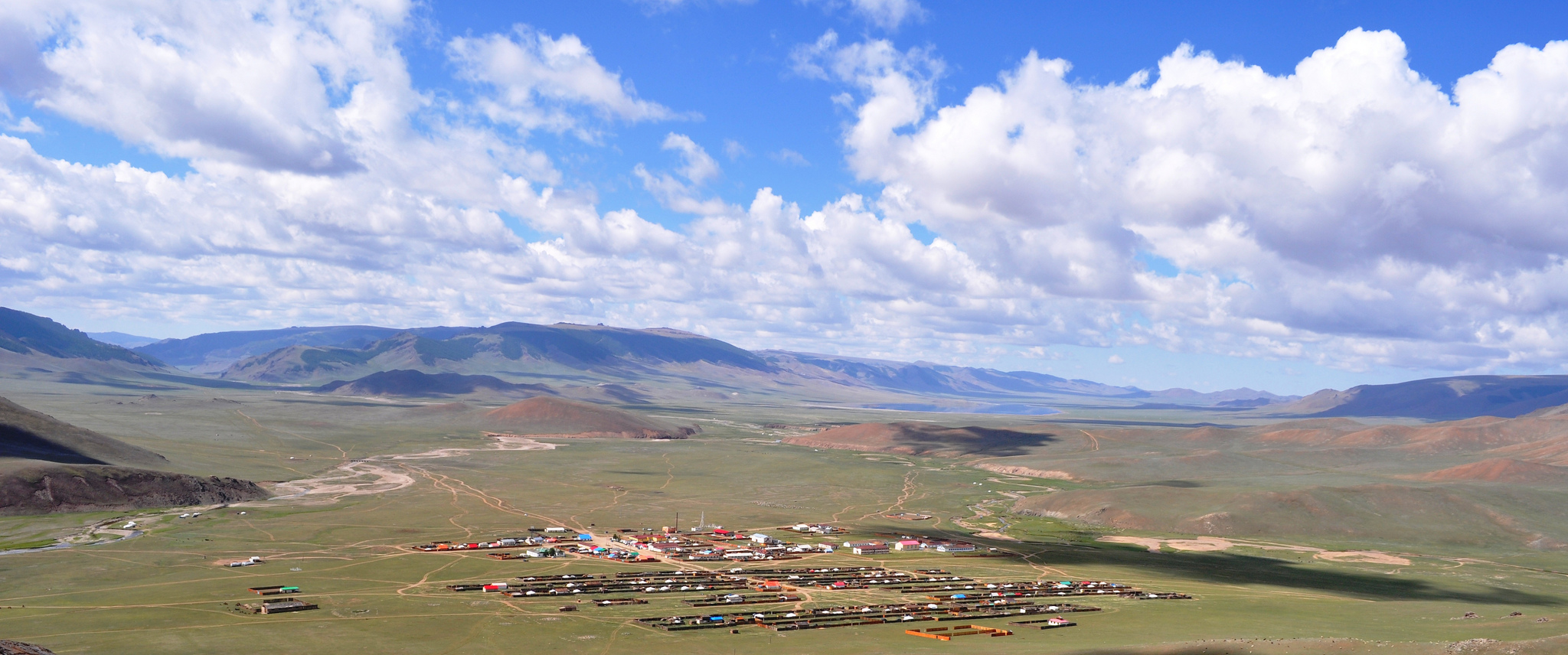 Монгол: Яруу сумын төв